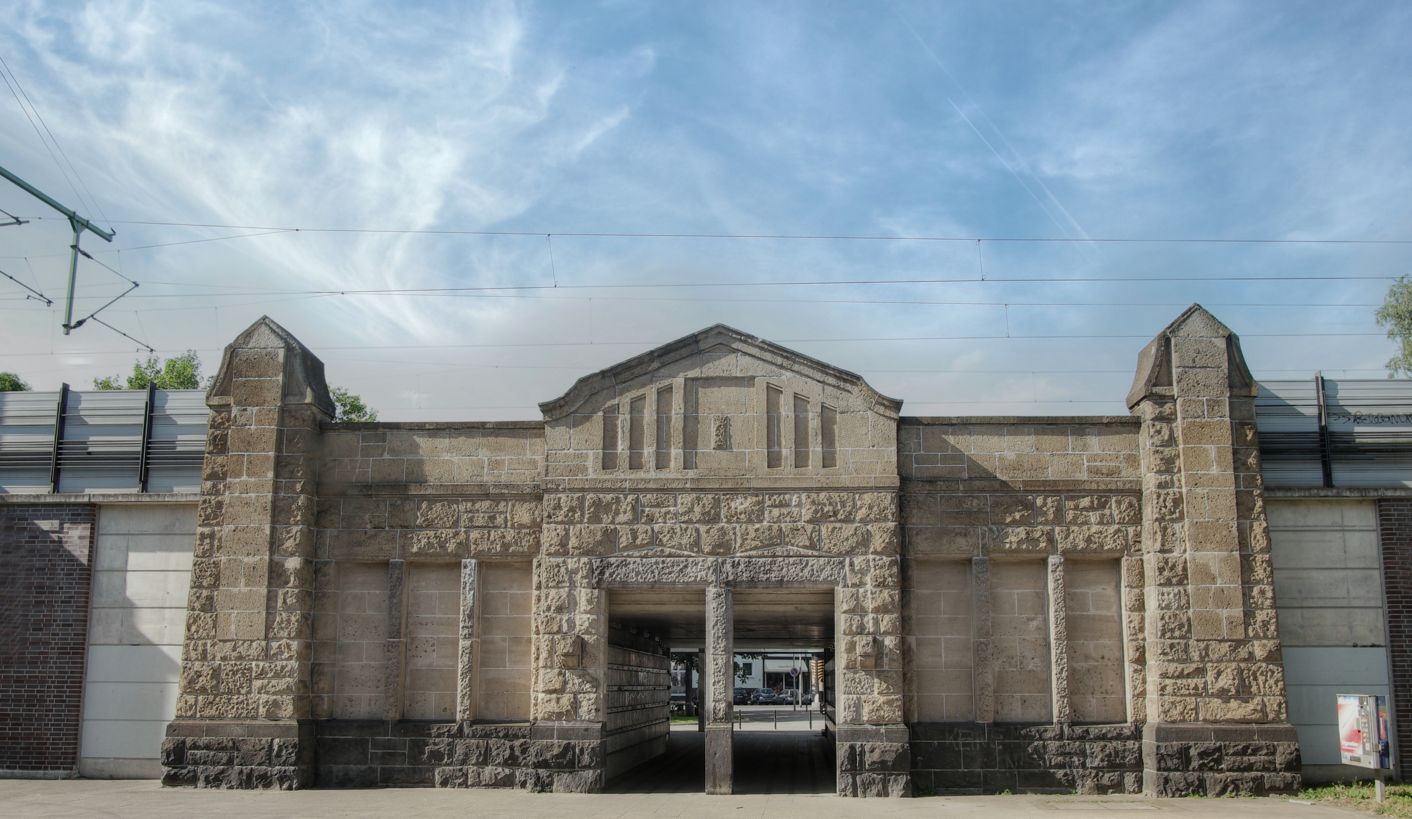 S-Bahn-Station Hannover-Kleefeld Senator-Bauer-Straße 12